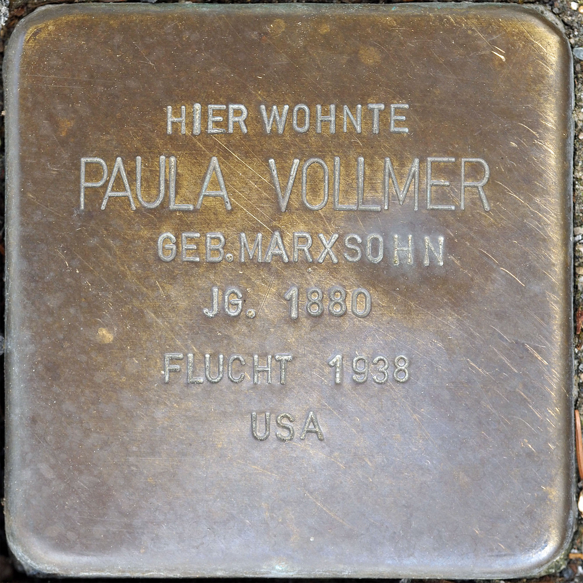 Stolpersteine MG: Vollmer, Paula